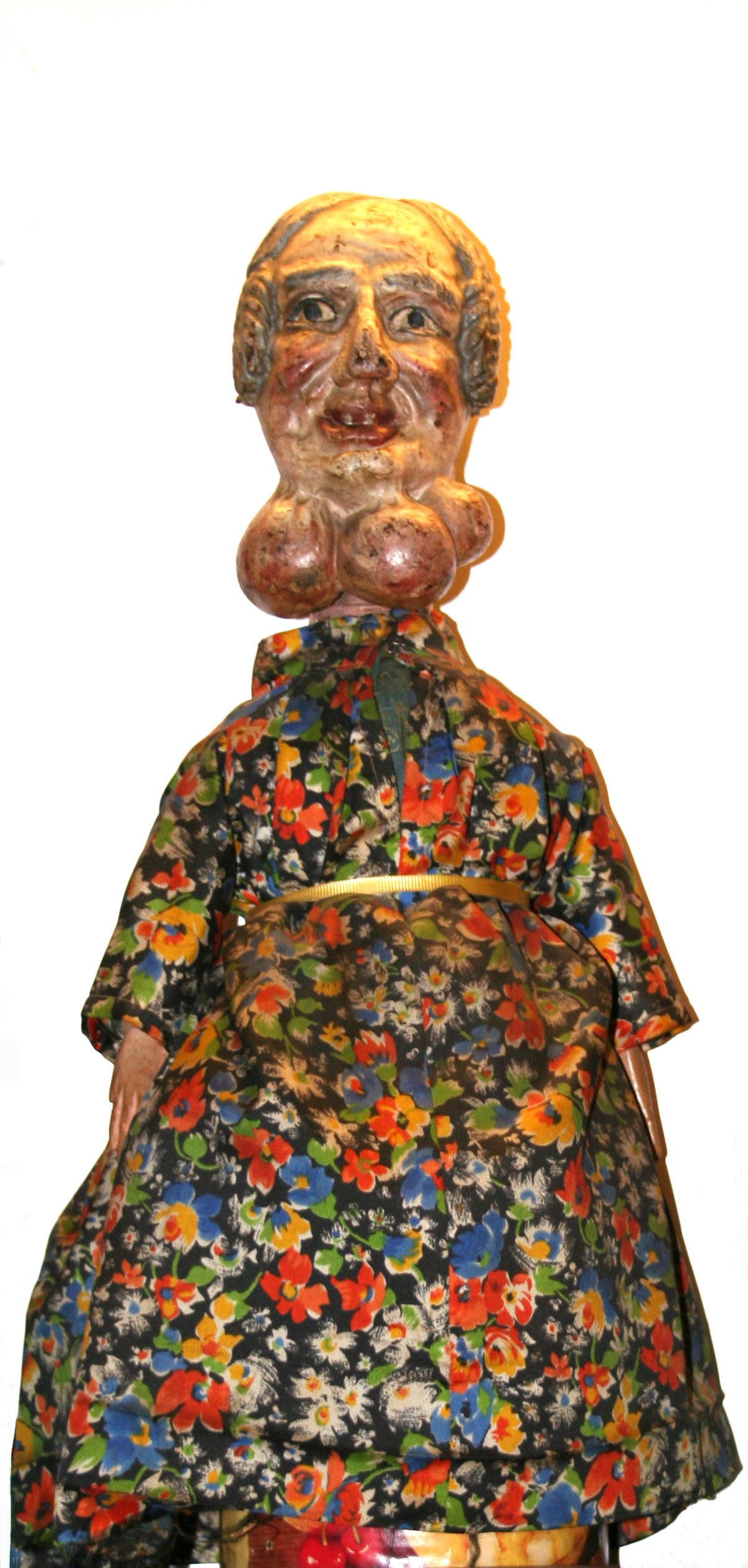 Autore Giorces. Bernarda, nonna di Giopì, maschera bergamasca.